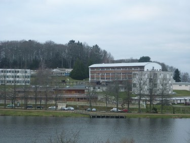 Le lycée vu du Lac de Courtille